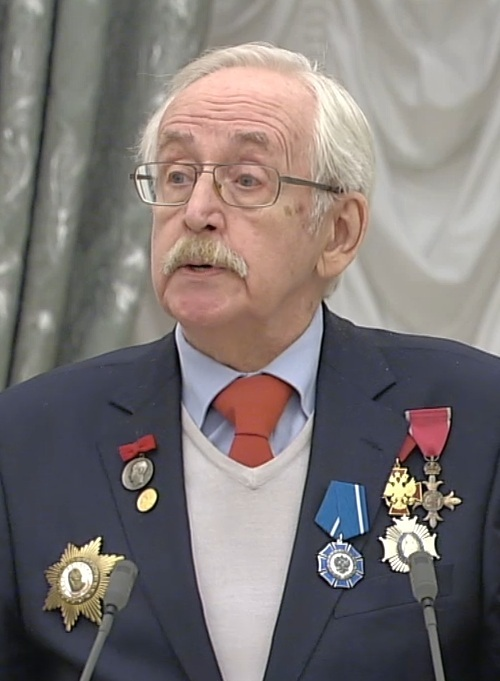 Советский и российский актёр кино Василий Ливанов на церемонии вручения государственных наград в Кремле, 26 января 2017 года.